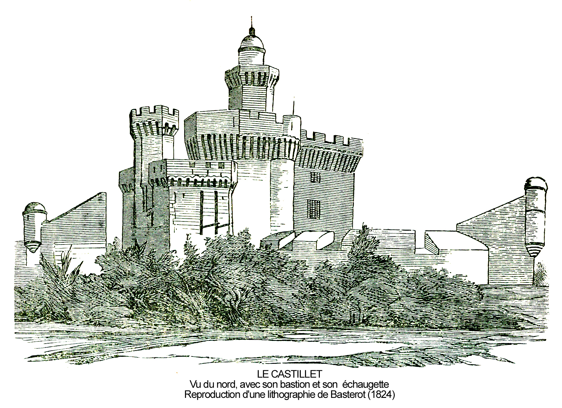 Perpignan - le Castillet - Vu du nord, avec son bastion et son échaugette Reproduction d'une lithographie de Basterot (1824)